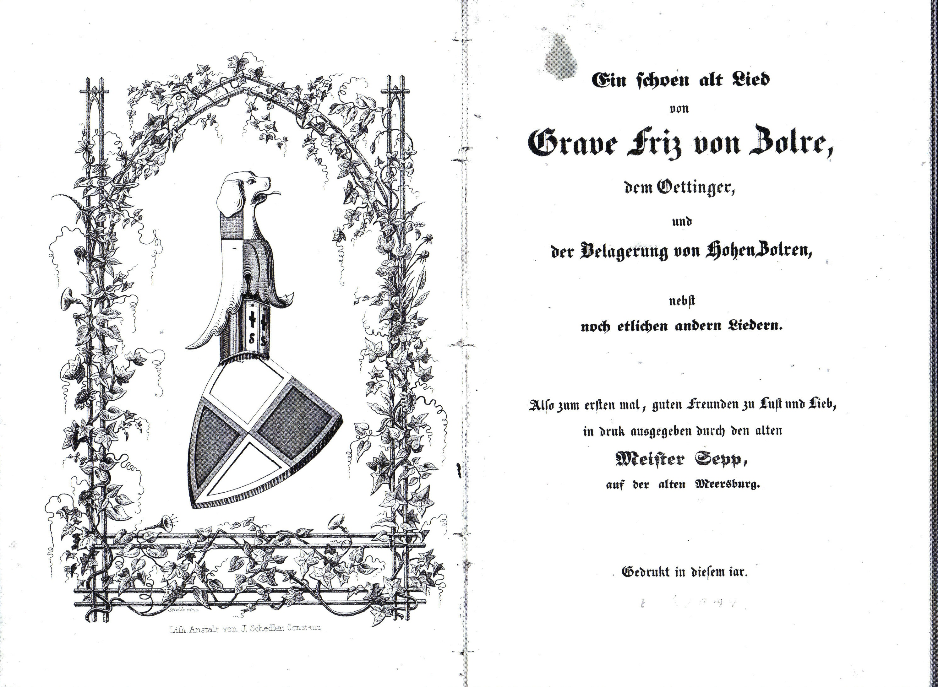 Ein schoen alt Lied von Grave Friz von Zolre ... o.O. 1842